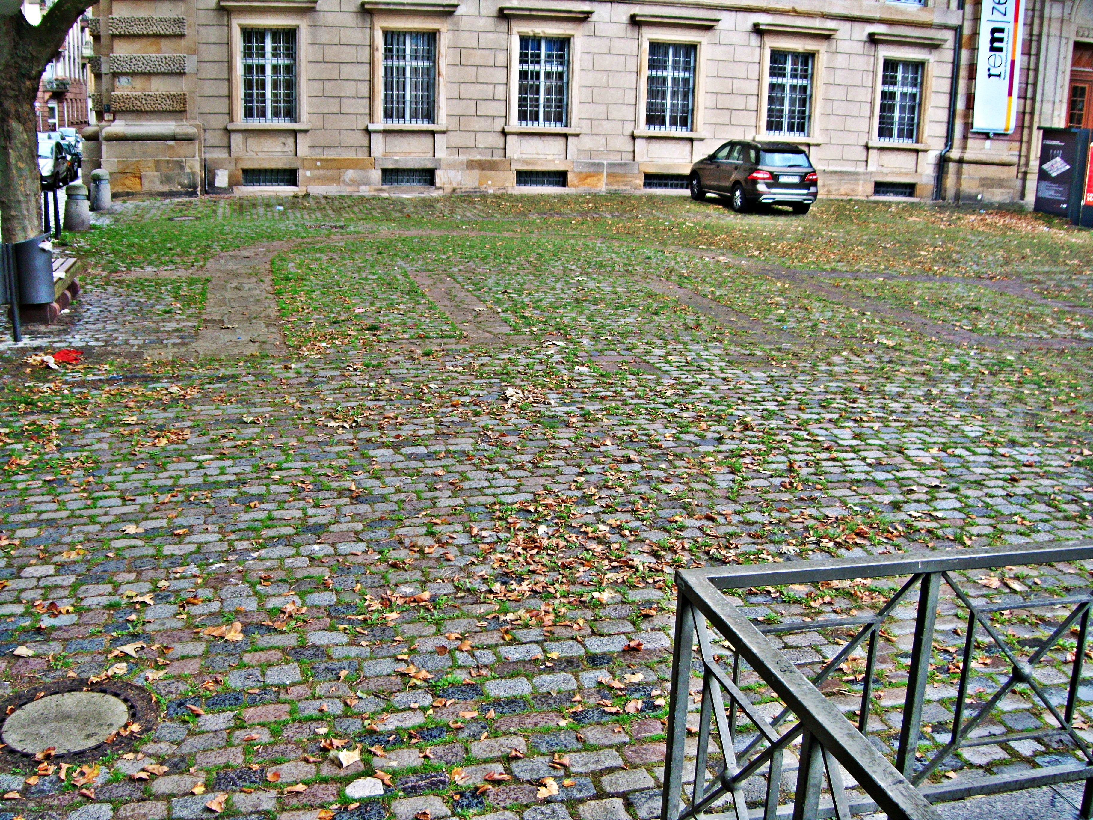 Mannheim, Toulonplatz, Grundriß des Chores der ehemaligen Garnisonskirche im Straßenpflaster, im Hintergrund das Zeughaus